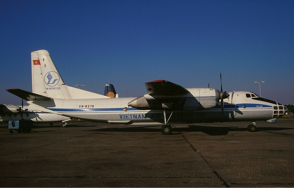 VASCO Antonov An-30 @ Yangon